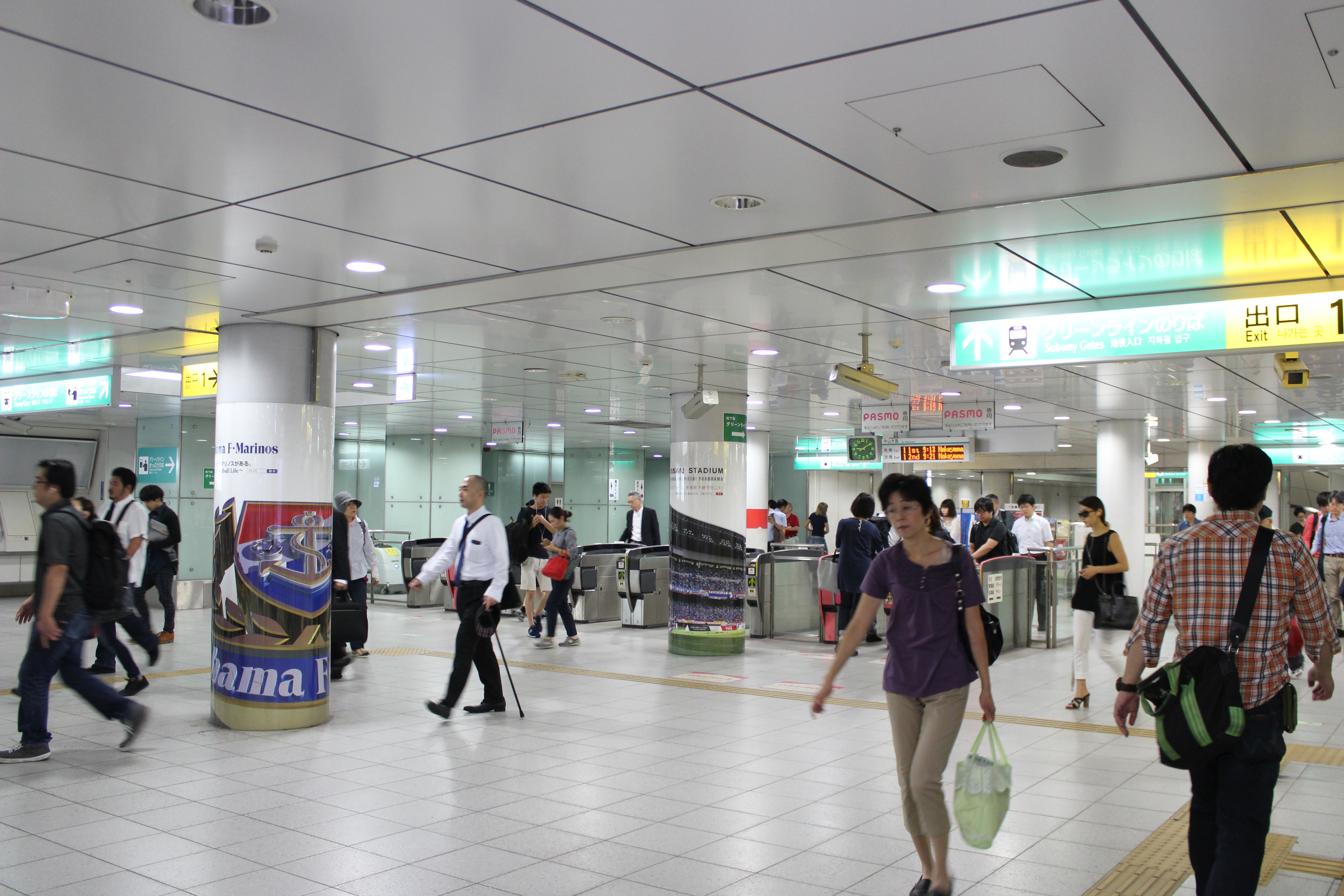 横浜市営地下鉄グリーンライン 日吉駅地下改札